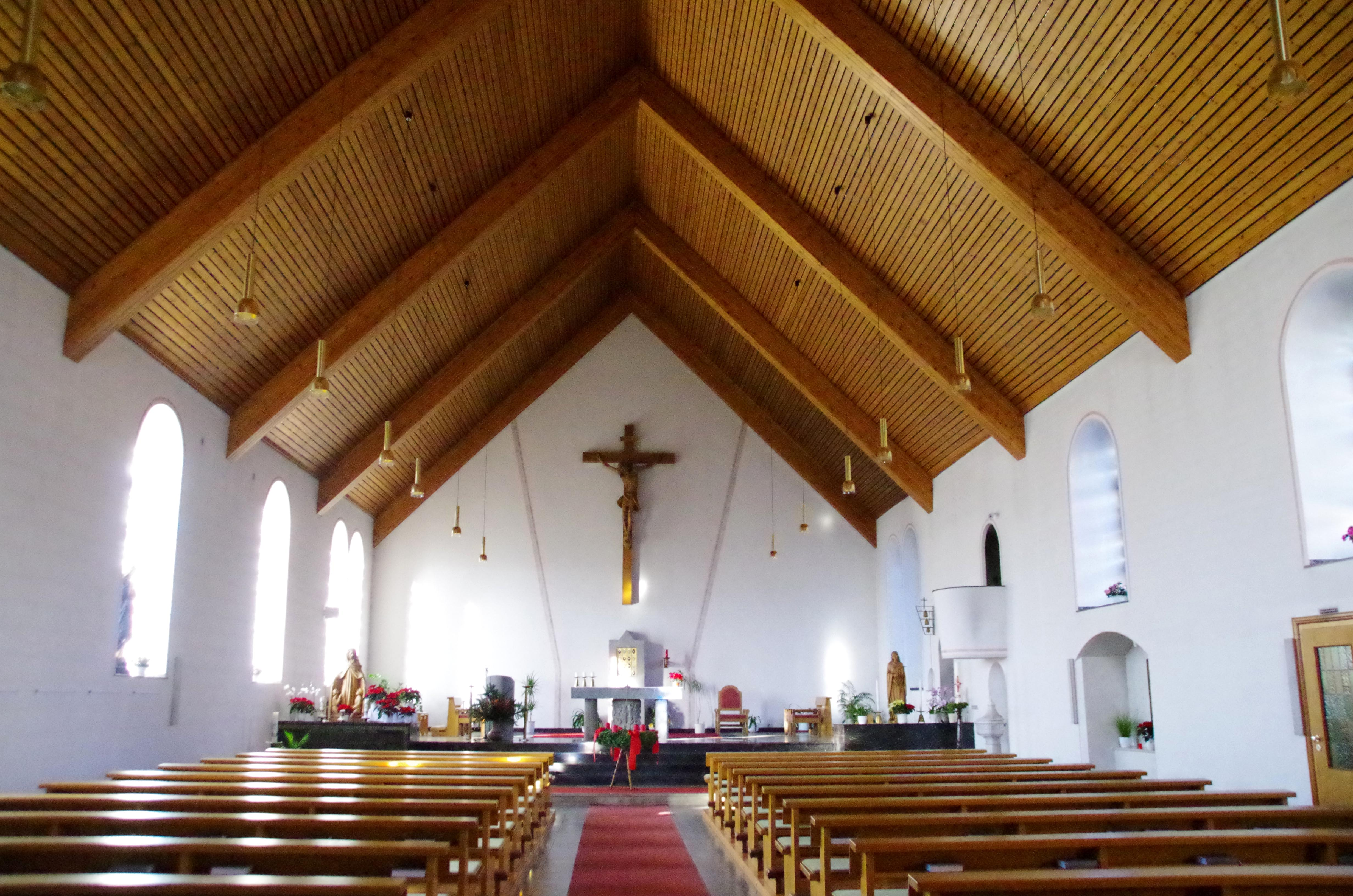 St. Lucia (Eicherscheid), Kirchenschiff mit Blick zum Altar